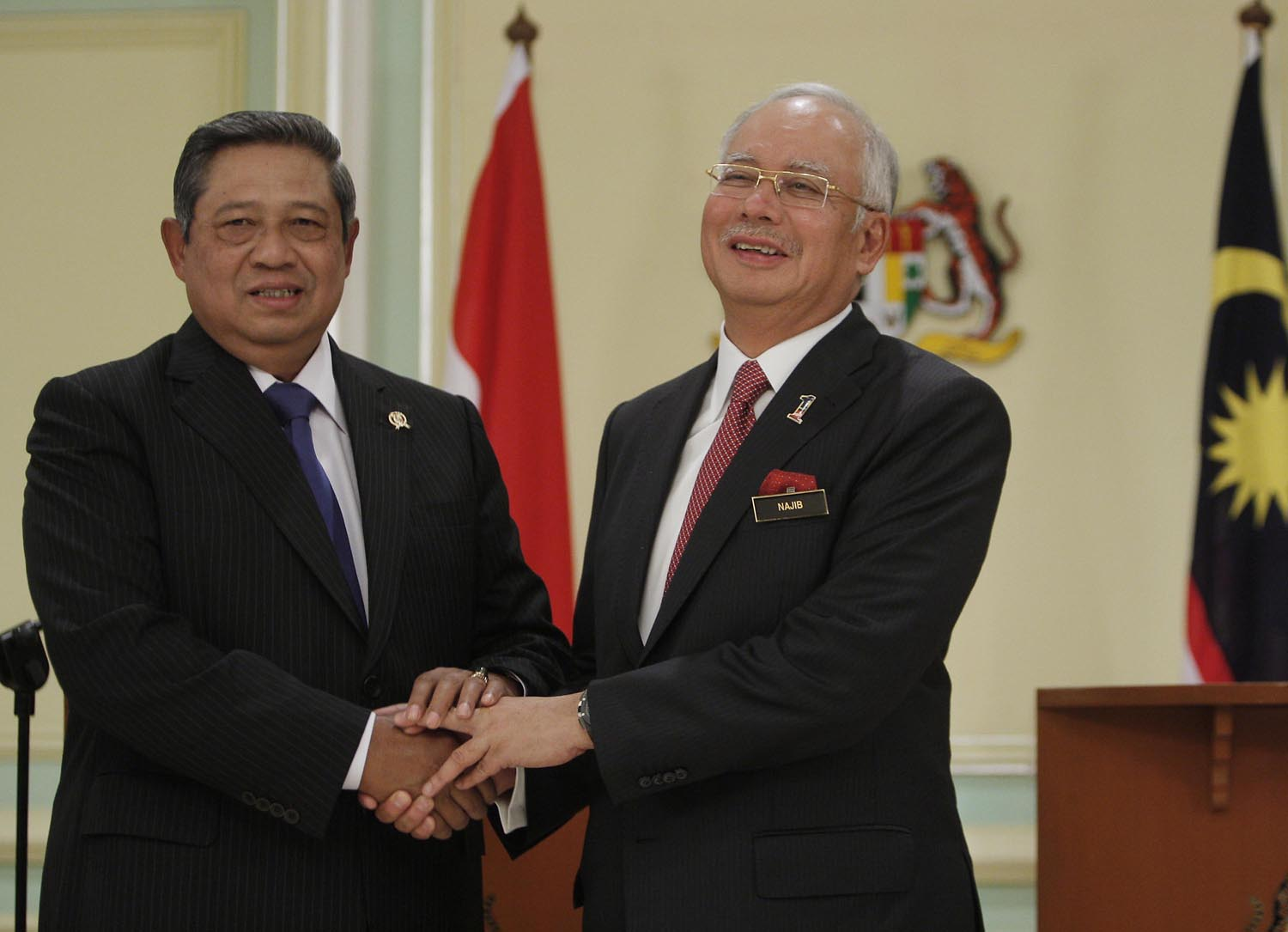 Presiden SBY bersama PM Najib pada Pertemuan Konsultasi Tahunan ke-9 antara Indonesia dan Malaysia di Putrajaya, 18 Desember 2012.